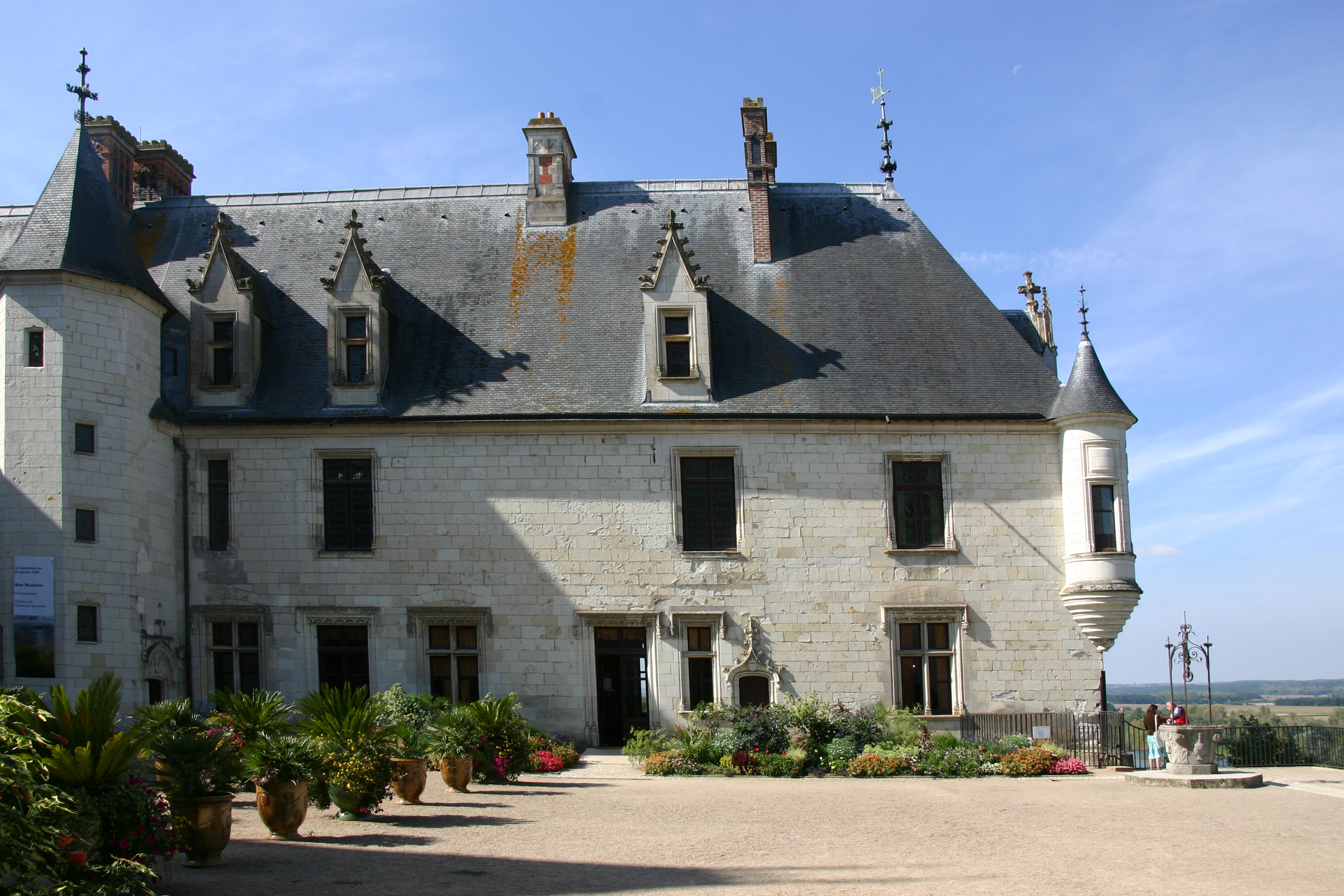 Château de Chaumont-sur-Loire